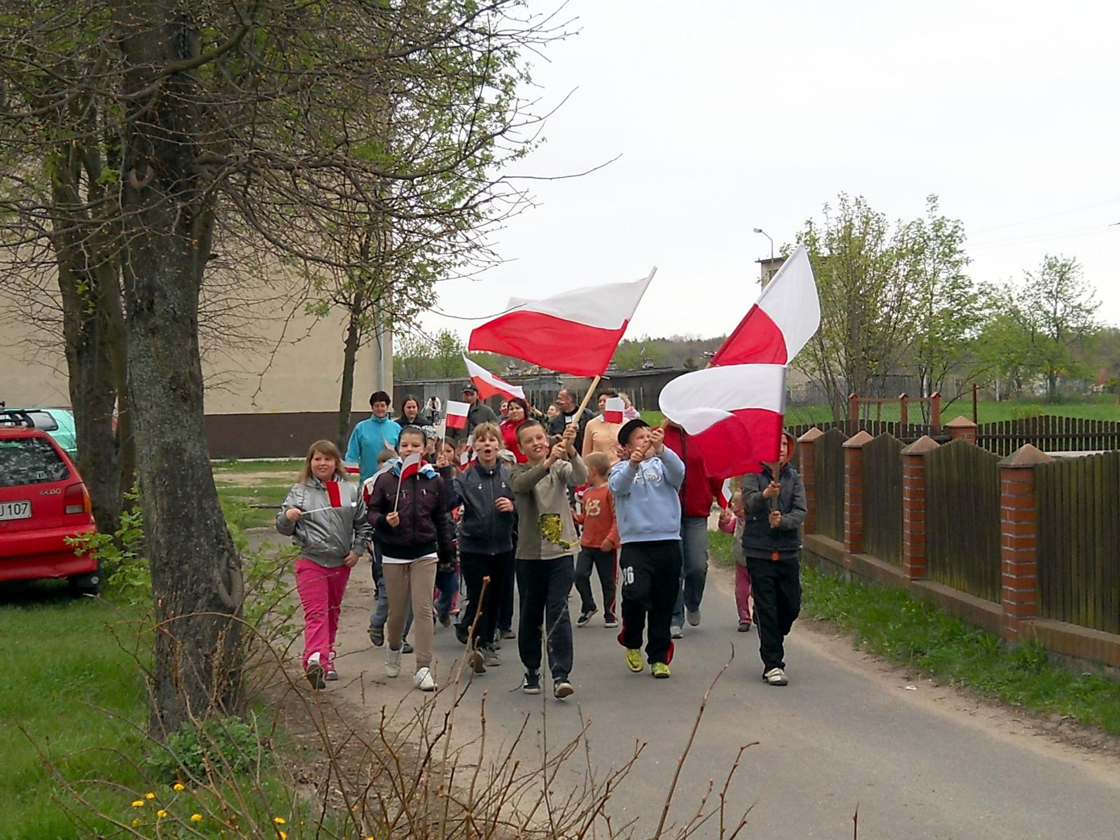 Wojcieszyce. Dzień flagi.